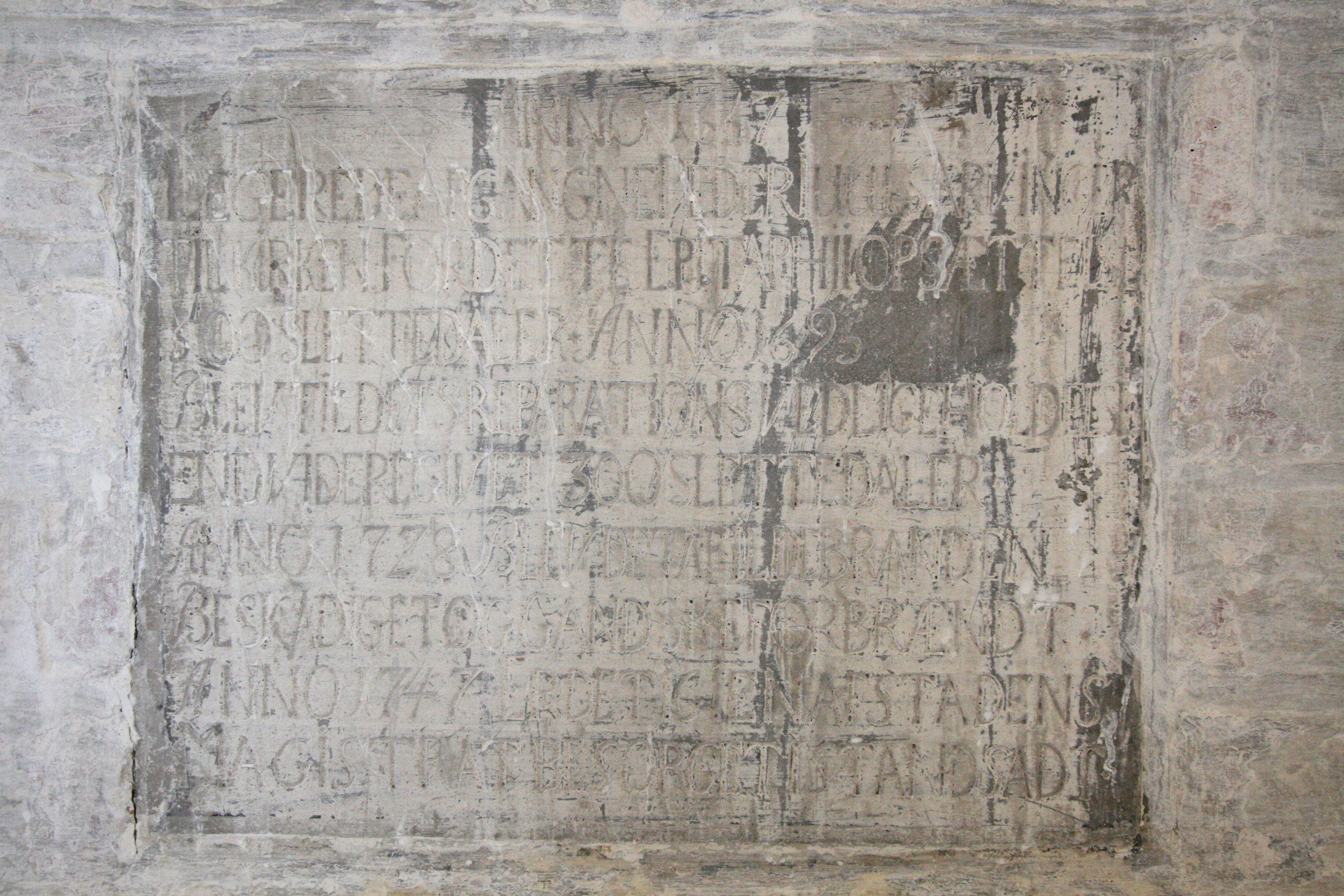 Helligåndskirken, Copenhagen, Denmark. Epitaph over Peder Juul, 1667. Inscription: ANNO 1667 LEGEREDE AFGANGNE PEDER IUULS ARVINGER TIL KIRKEN FOR DETTE EPITAPHII OPSÆTTELSE 500 SLETTEDALER ANNO 1695 BLEV TIL DETS REPARATIONS VEDLIGEHOLDELSE ENDVIDERE GIVET 300 SLETTEDALER ANNO 1728 BLEV DET AF ILDEBRANDEN BESKADIGET OG GANDSKE FORBRÆNDT ANNO 1747 ER DET IGIEN AF STADENS MAGISTRAT BESORGET ISTANDSADT